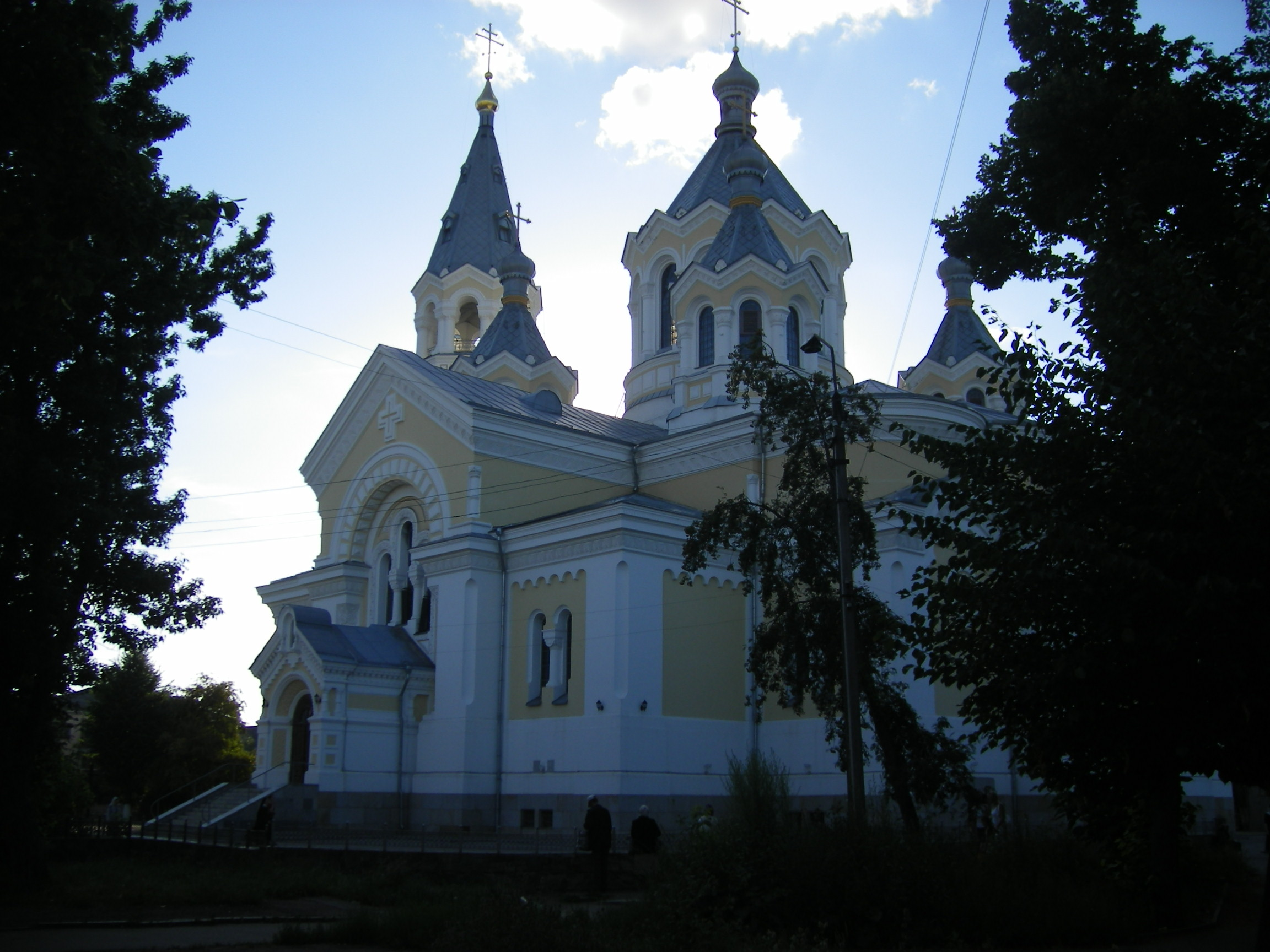 Zhytomyr, Preobrazhenskyy Sobor